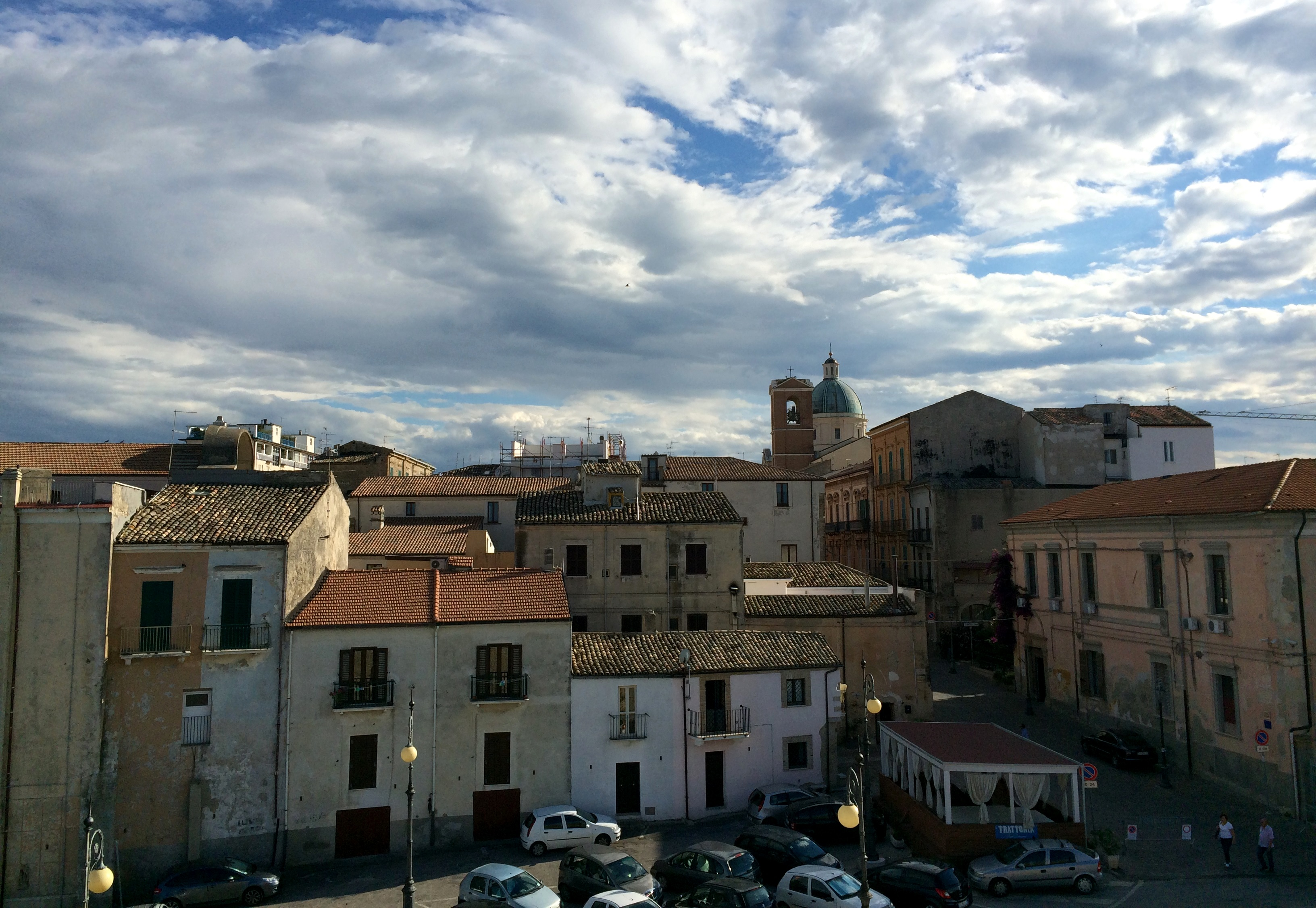 Veduta di Ortona, Chieti.